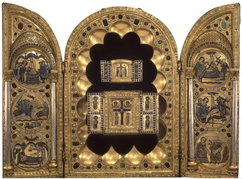 Triptyque de Stavelot Pierpont Morgan Library